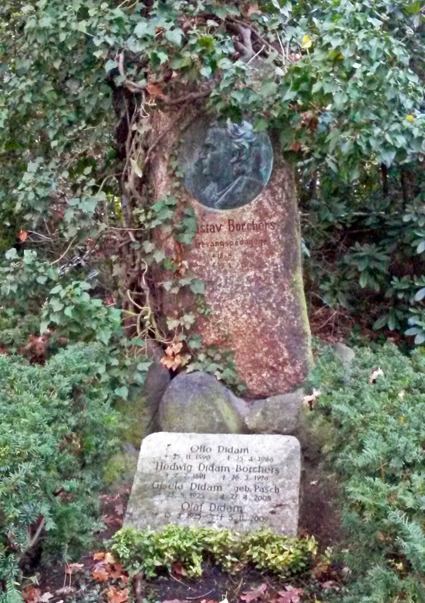 Grabstätte Borchers-Didam auf dem Südfriedhof Leipzig mit dem Bildnisrelief Gustav Borchers von Werner Stein und der Namensplatte für die Tochter Hedwig Didam-Borchers und ihren Ehemann Otto Didam sowie deren Sohn Olaf Didam und dessen Ehefarau Gisela, geb. Pasch